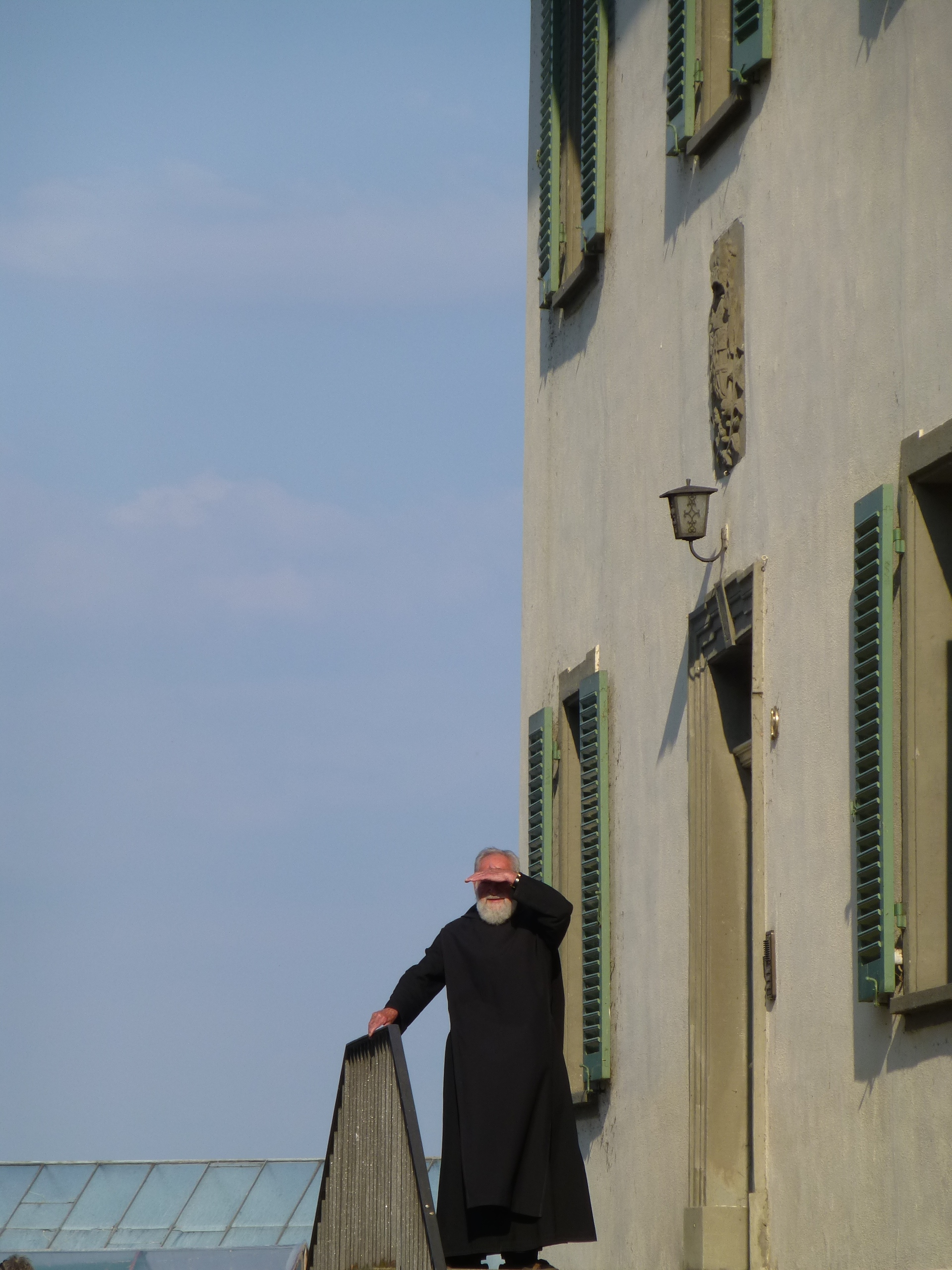 Nikolaus Egender OSB an der Benediktinercella Insel Reichenau (2014)